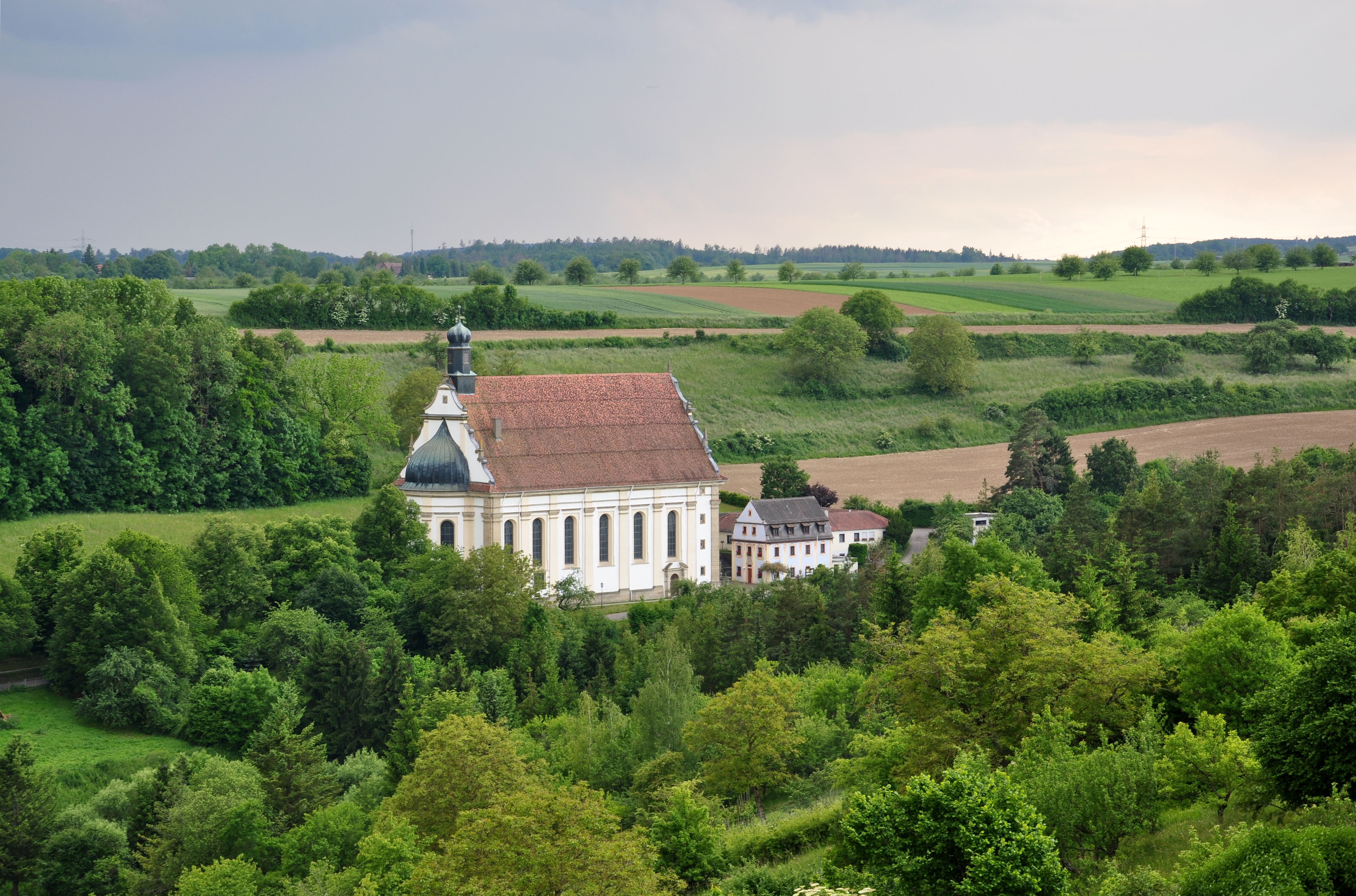 Wallfahrtskirche Weggental bei Rottenburg am Neckar